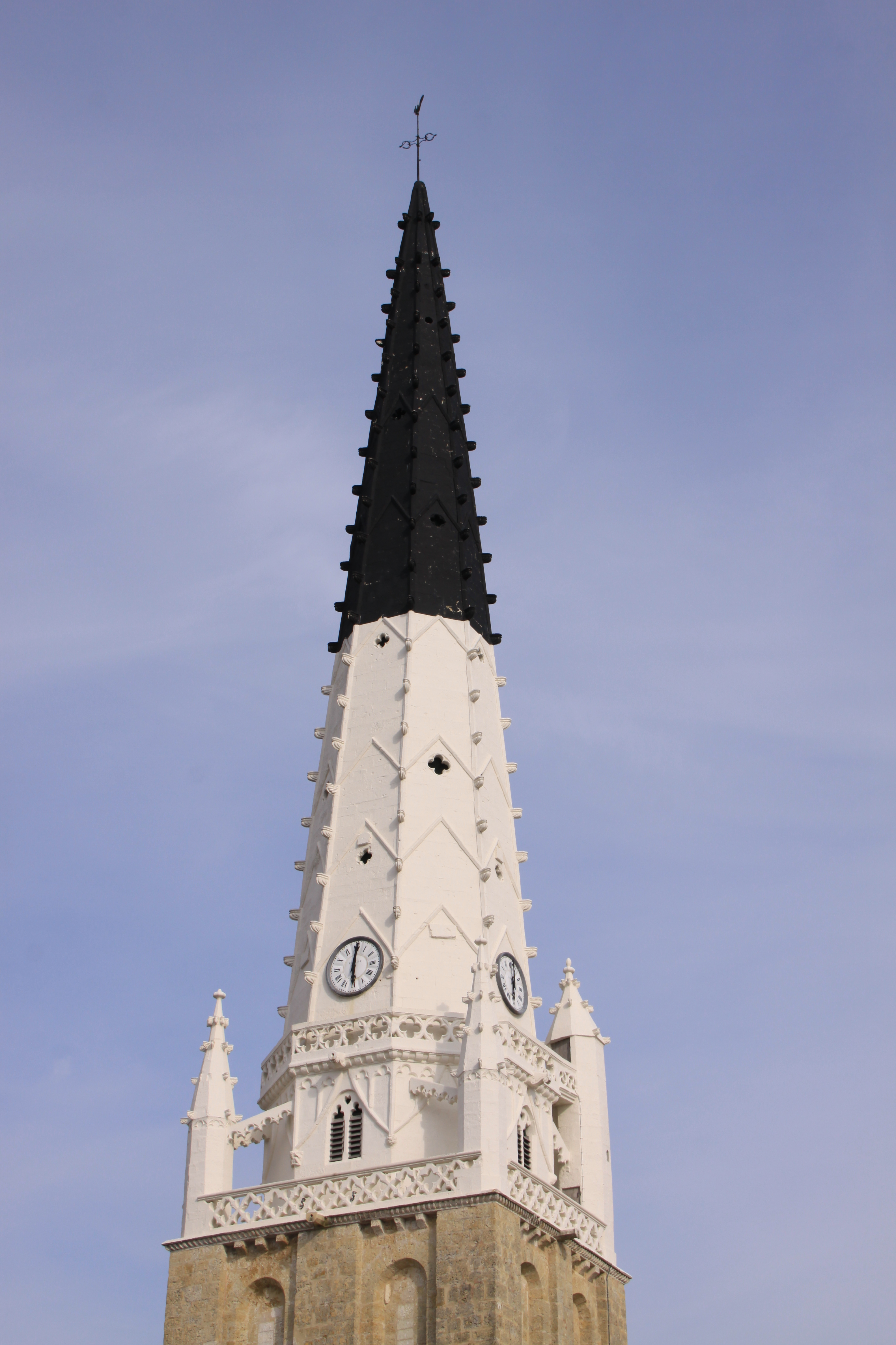 Pour la navigation maritime, le clocher de l’ église Saint-Etienne d’ Ars-en-Ré (le clocher d’ Ars) est un point remarquable et bien identifiable. Il est utilisé comme amer et permet, par exemple, aux marins qui évoluent dans le Pertuis Breton de localiser facilement le port d’ Ars-en-Ré. Le clocher d’Ars est un des principaux amers de l’ Île de Ré et le plus célèbre. Construit au XVème siècle, ce clocher, de style gothique, est formé d’une flèche de pierre octogonale à crochets. Cette flèche est peinte en deux couleurs depuis le XIXème siècle: en blanc jusqu’ à mi-hauteur puis en noir jusqu’au sommet. Le blanc est encore visible dans obscurité et le noir peut être vu dans un ciel pâle. Le clocher de l’ église Saint-Etienne mesure une quarantaine de mètres de haut. Ars-en-Ré (Île de Ré), Charente Maritime, France.